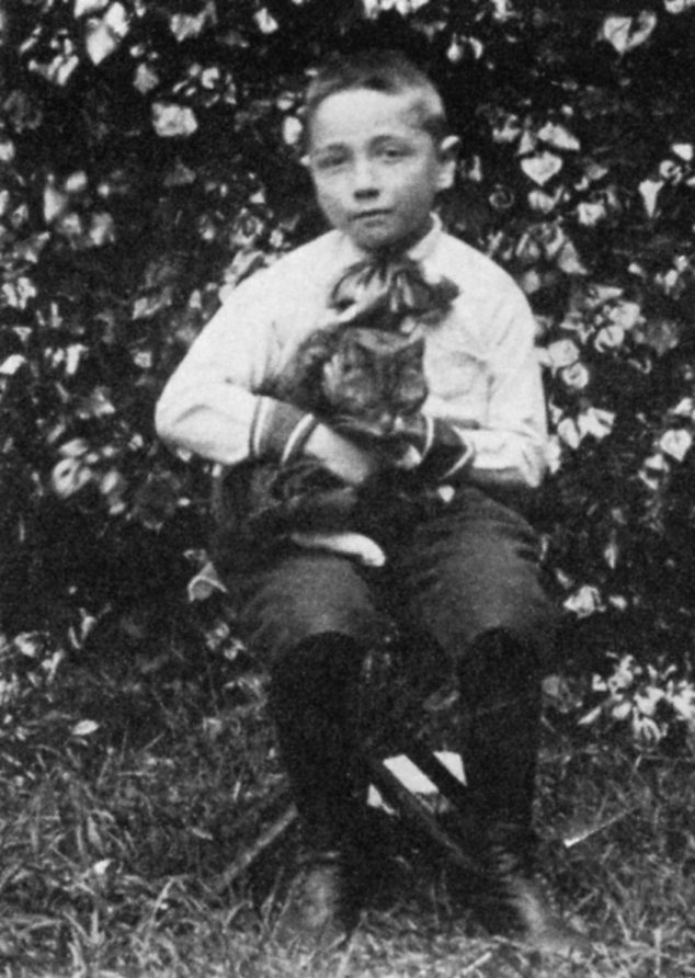 Schrijver Simon Vestdijk als jongen, foto genomen door zijn vader te Harlingen ca. 1905